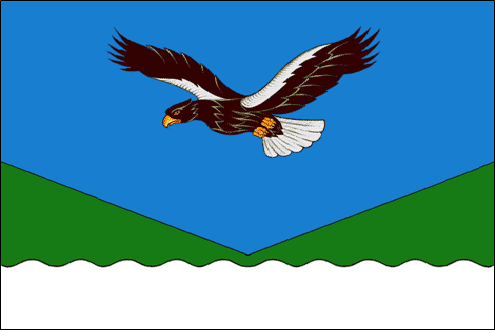 Флаг Николаевского муниципального района Хабаровского края